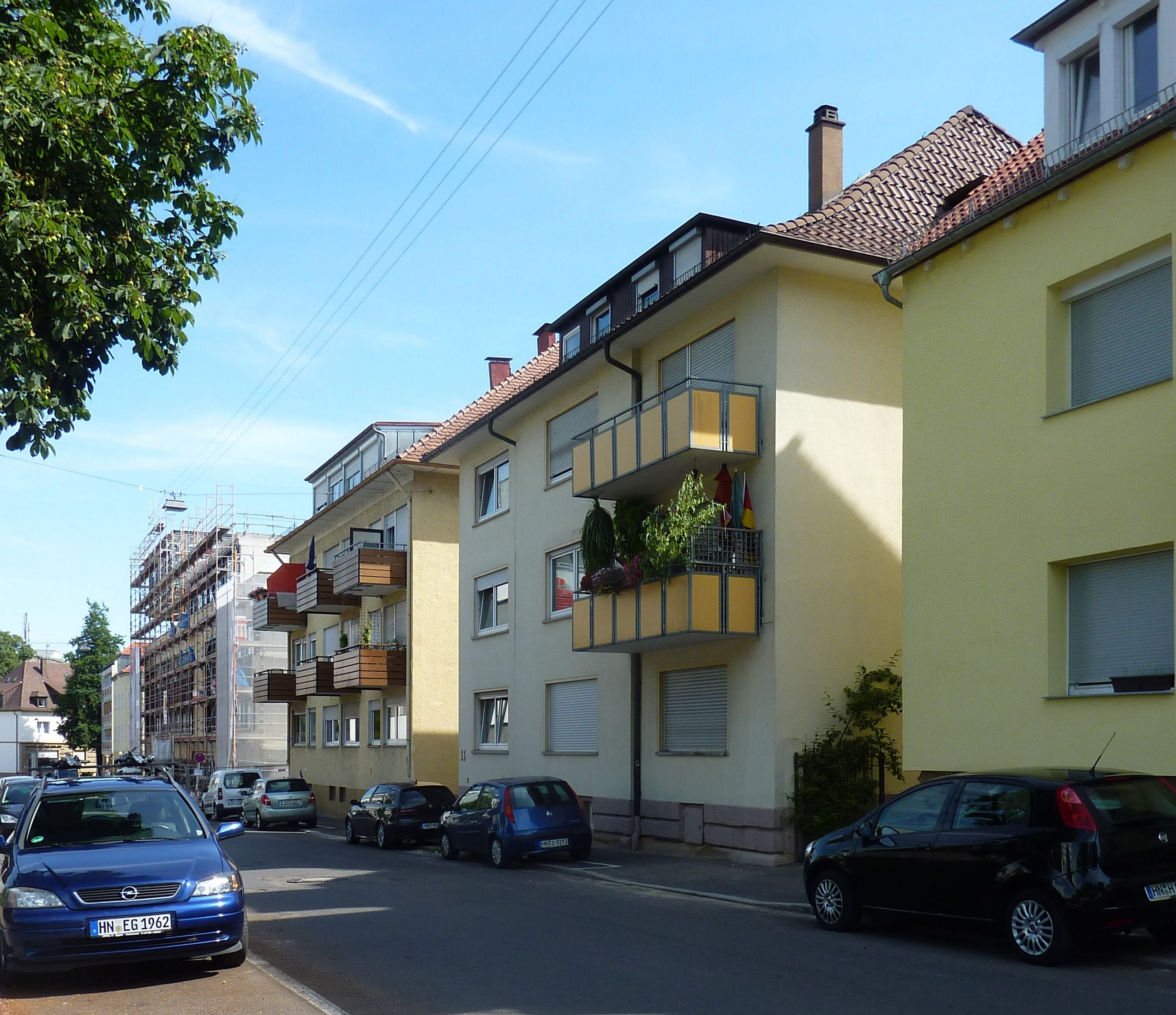 Uhlandstraße Heilbronn, in der Mitte Nr. 11